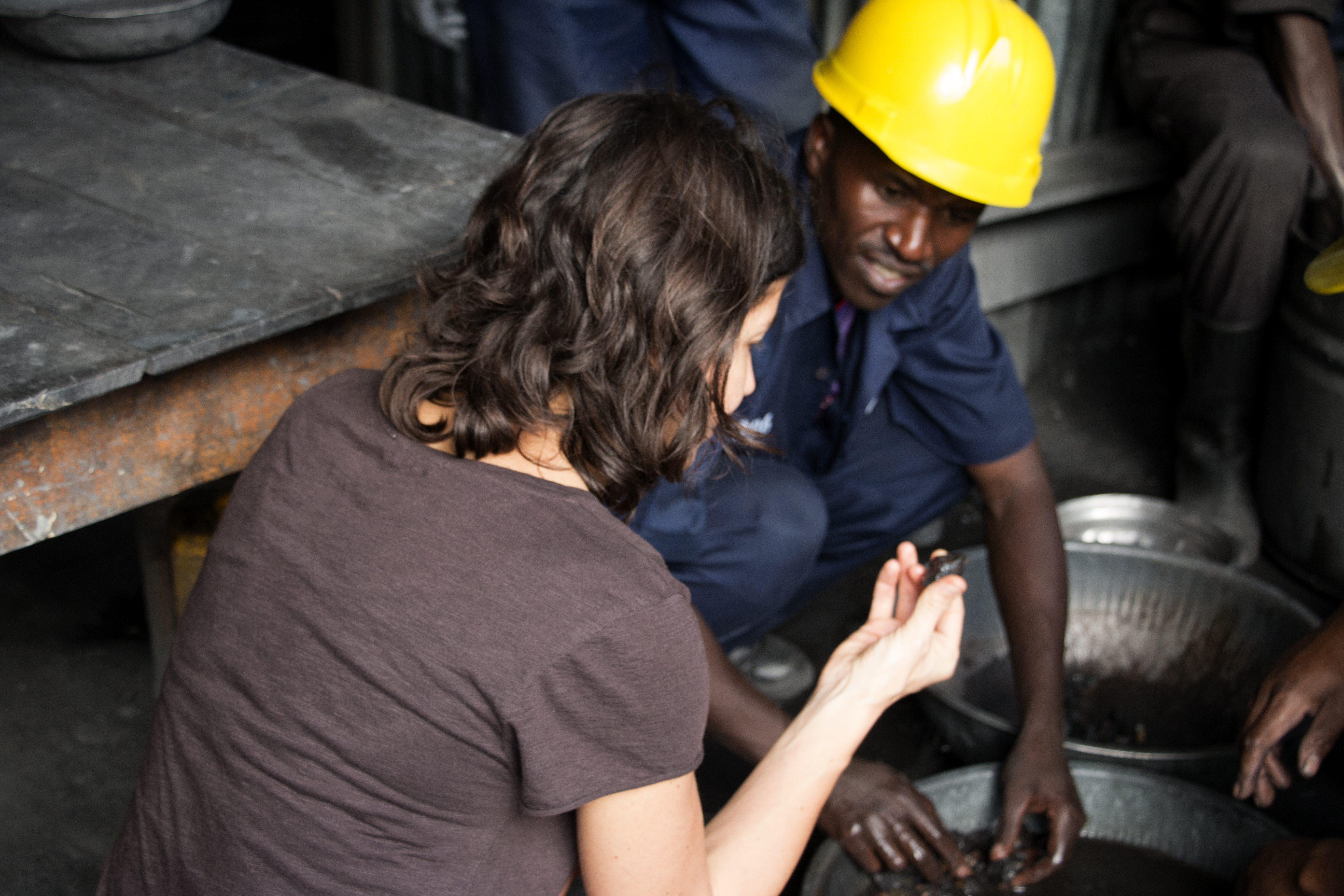 Monique Lempers from Fairphone at the mine